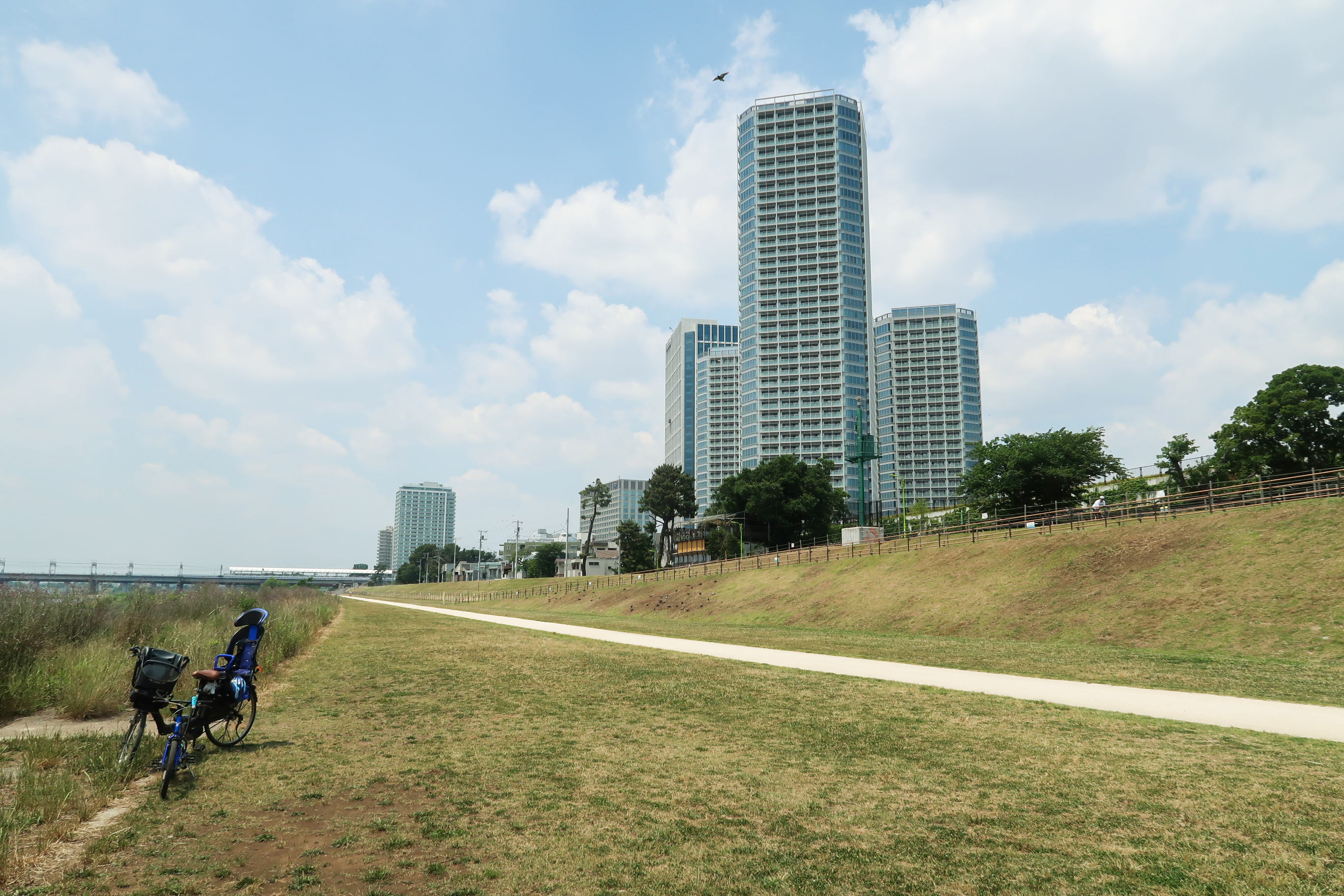 Futako-Tamagawa Riverside Walkway_2018